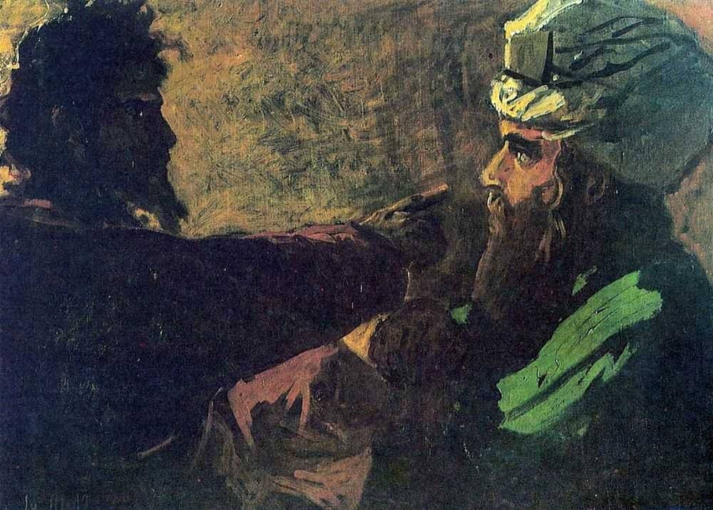 Ге Николай Николаевич. Христос и Никодим. Эскиз. 1889